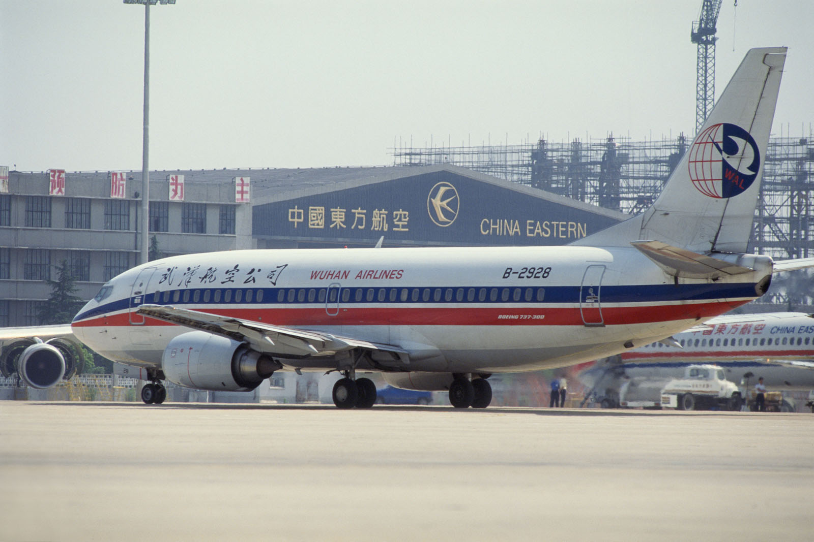 Wuhan Airlines Boeing 737-300